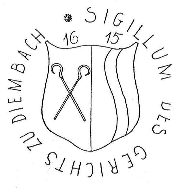 Gerichtssiegel von 1615, Dimbach, "Gespalten; vorne zwei gekreuzte Abtsstäbe, hinten ein Wellenpfahl; Tingierung unklar